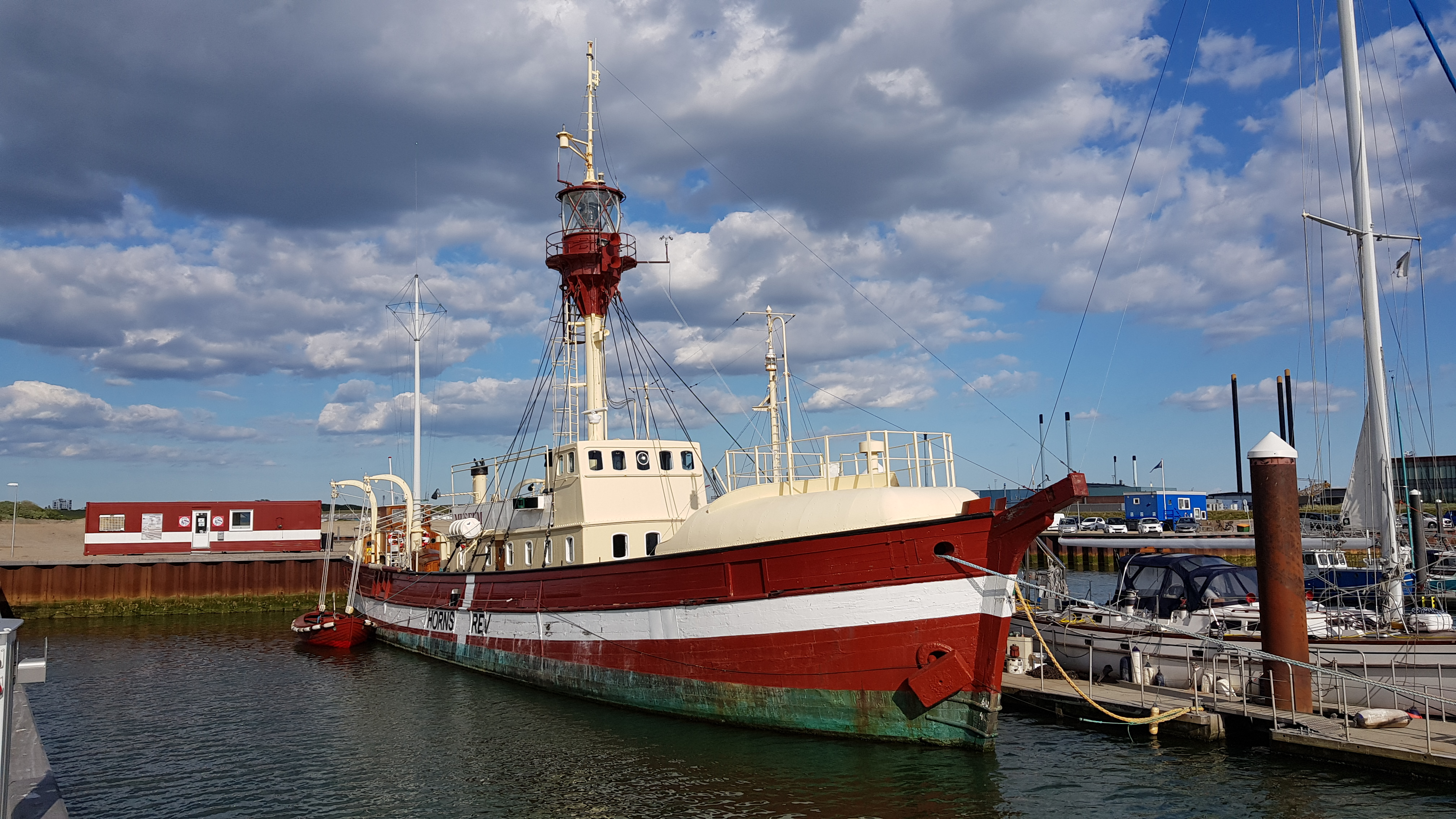 Motorfyrskibet Horns Rev ved Havneøen i Esbjerg